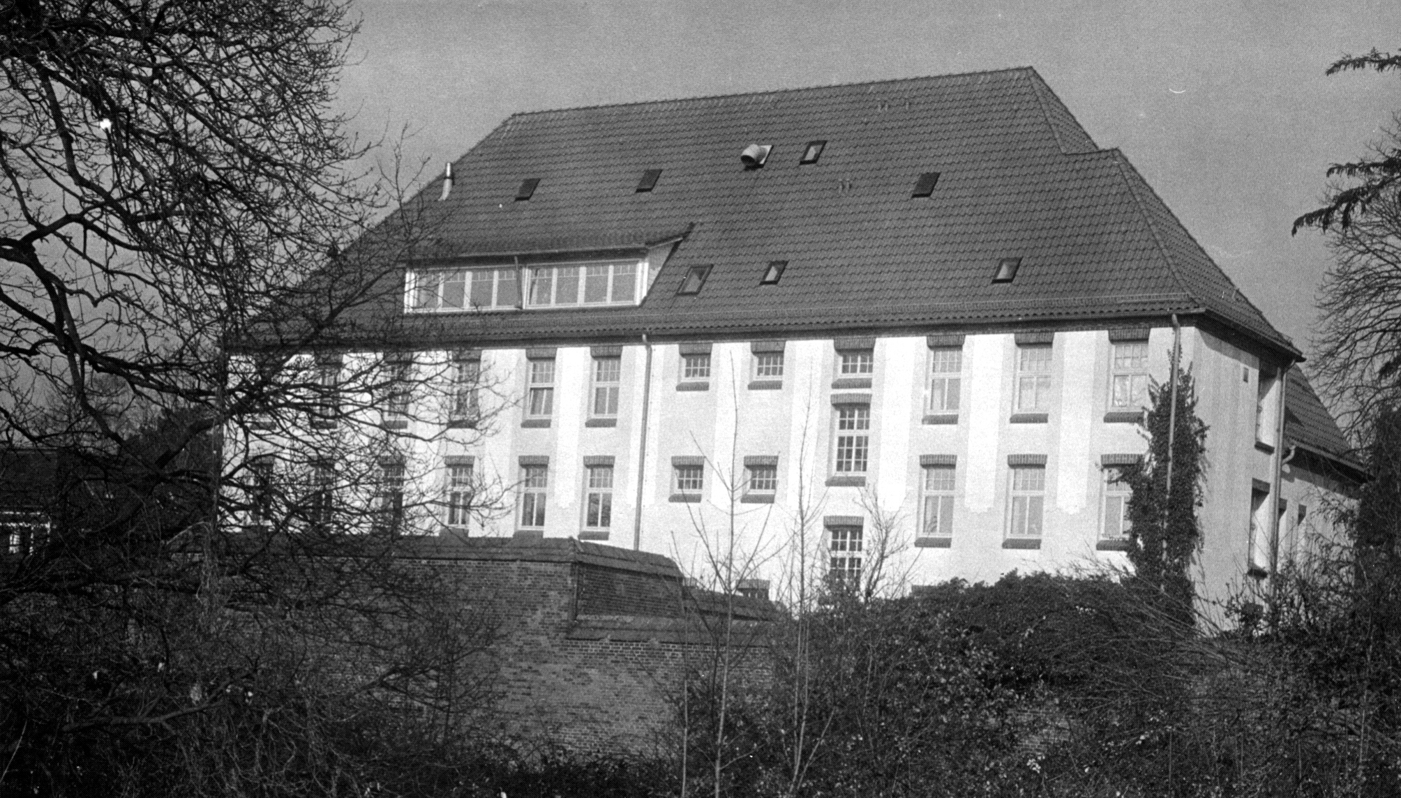 Ansicht des ehemaligen Gefängnisses hinterm Amtsgericht Blumenthal